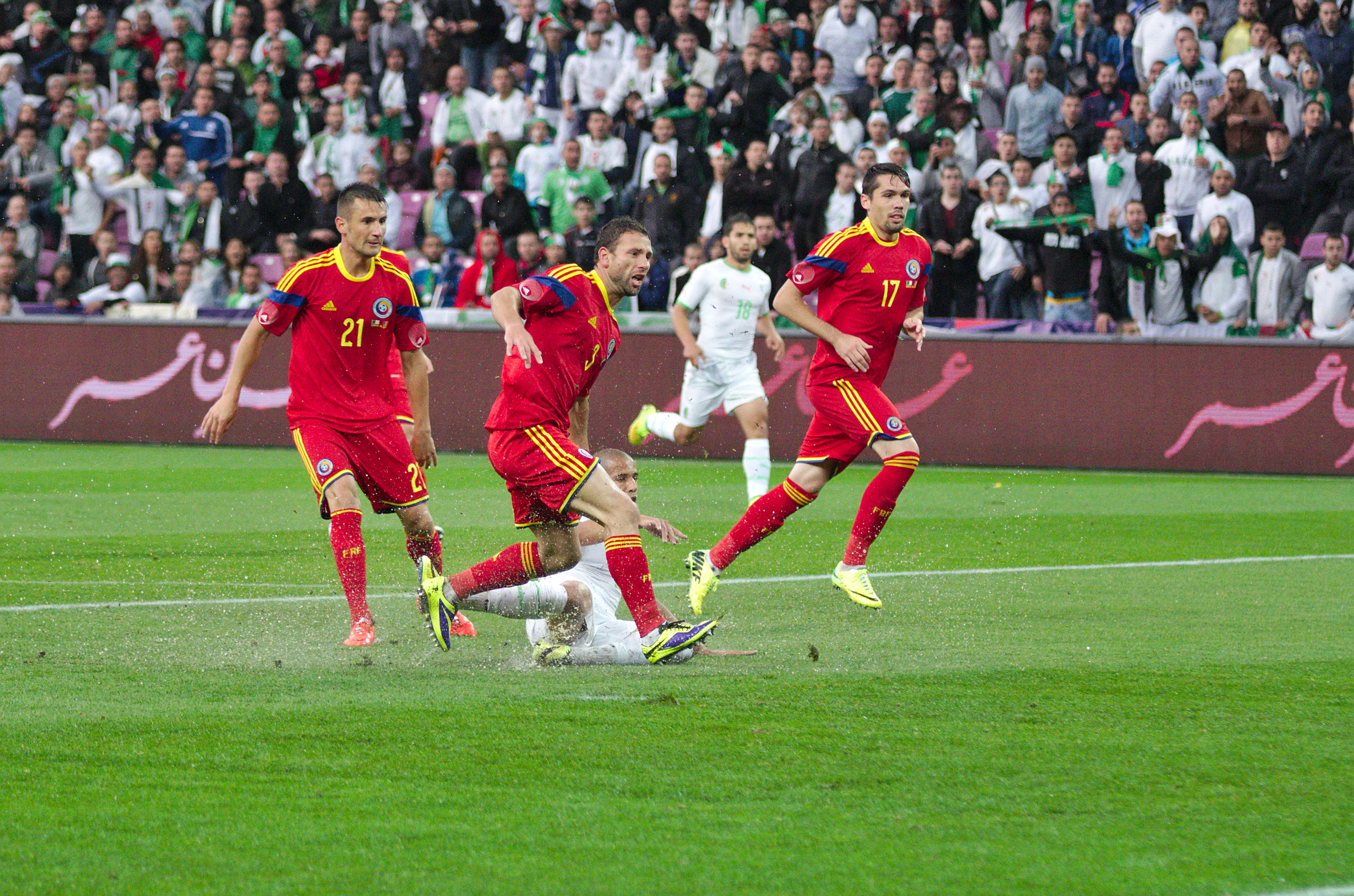 Algérie-Roumanie - 20140604 - Abdelmoumene Djabou